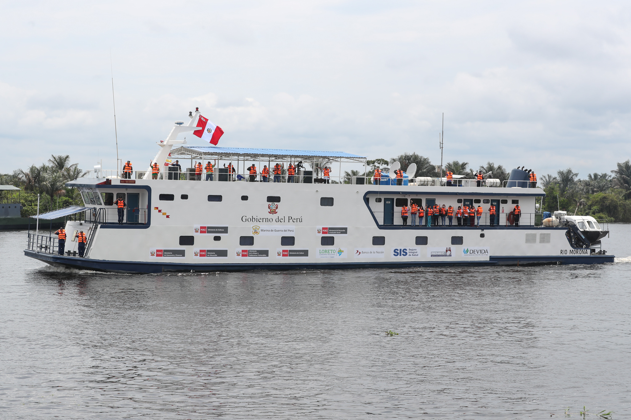 PIAS Río Morona navegando en un río peruano